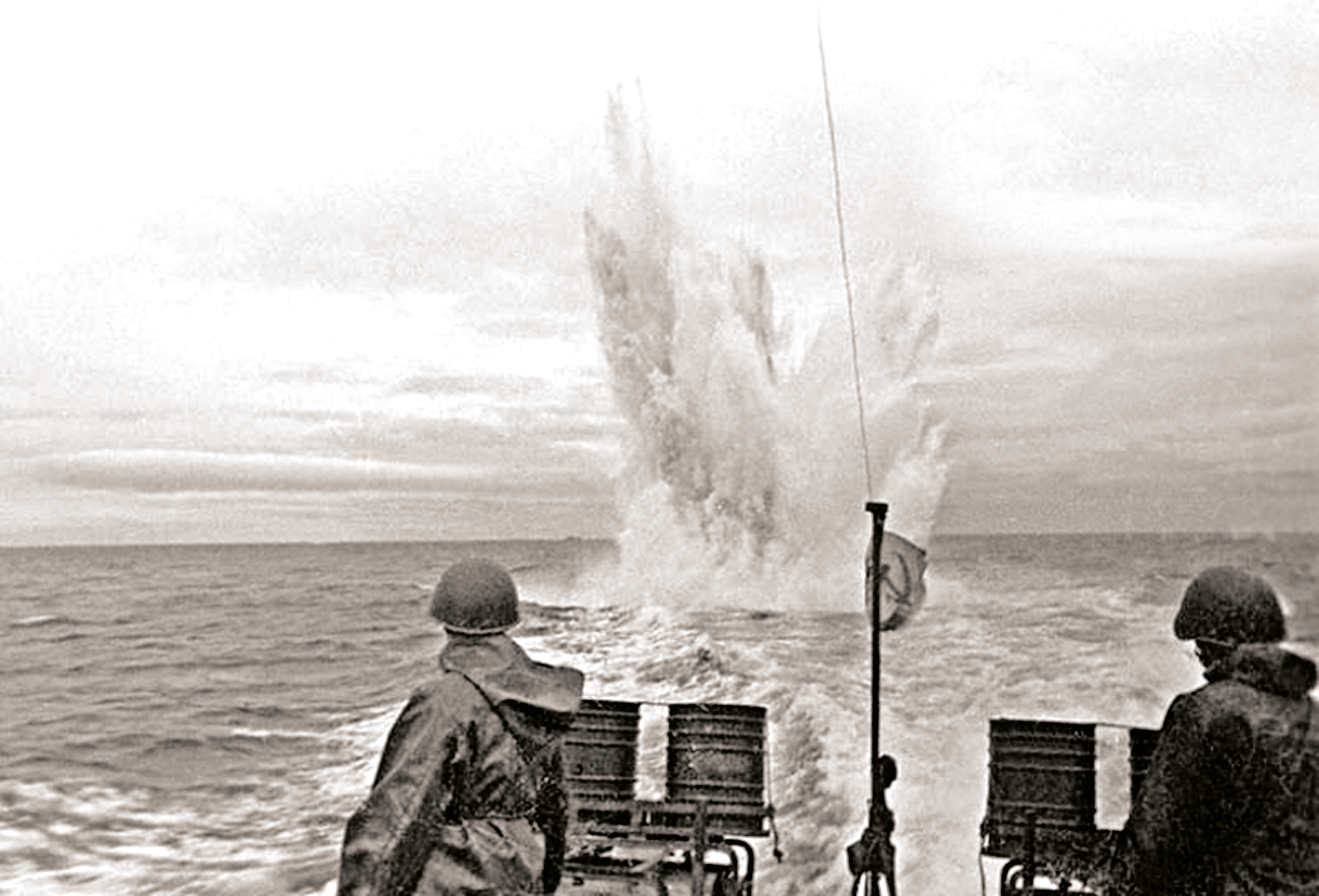 Azərbaycanın ilk kontr-admiralı Cəlil Cavadov